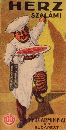 Herz szalámi plakát 1900 körül